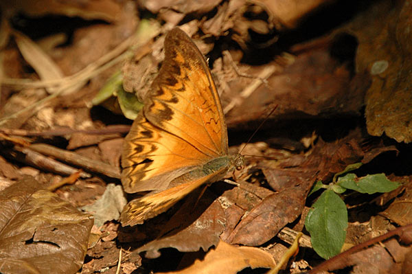 Uganda Kanyo Pabidi Res, Masindi, Uganda